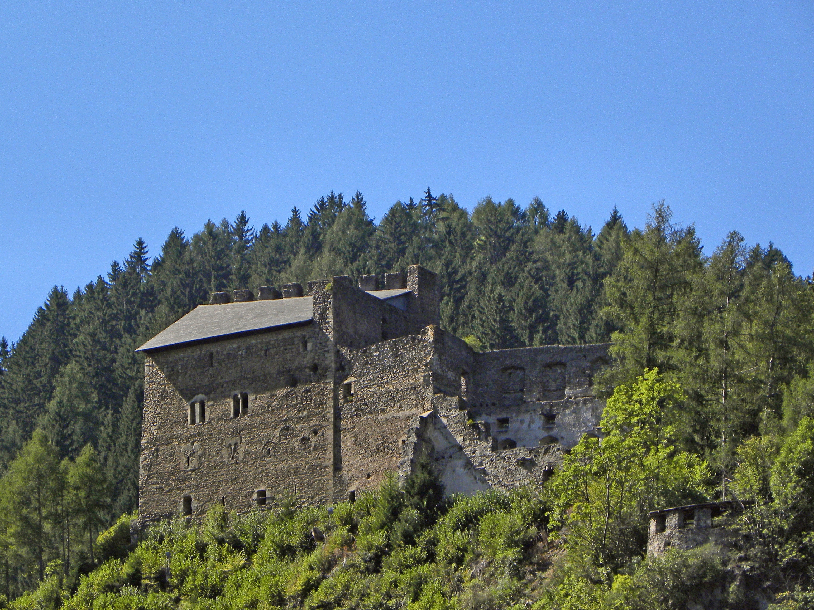 Burgruine Frauenburg